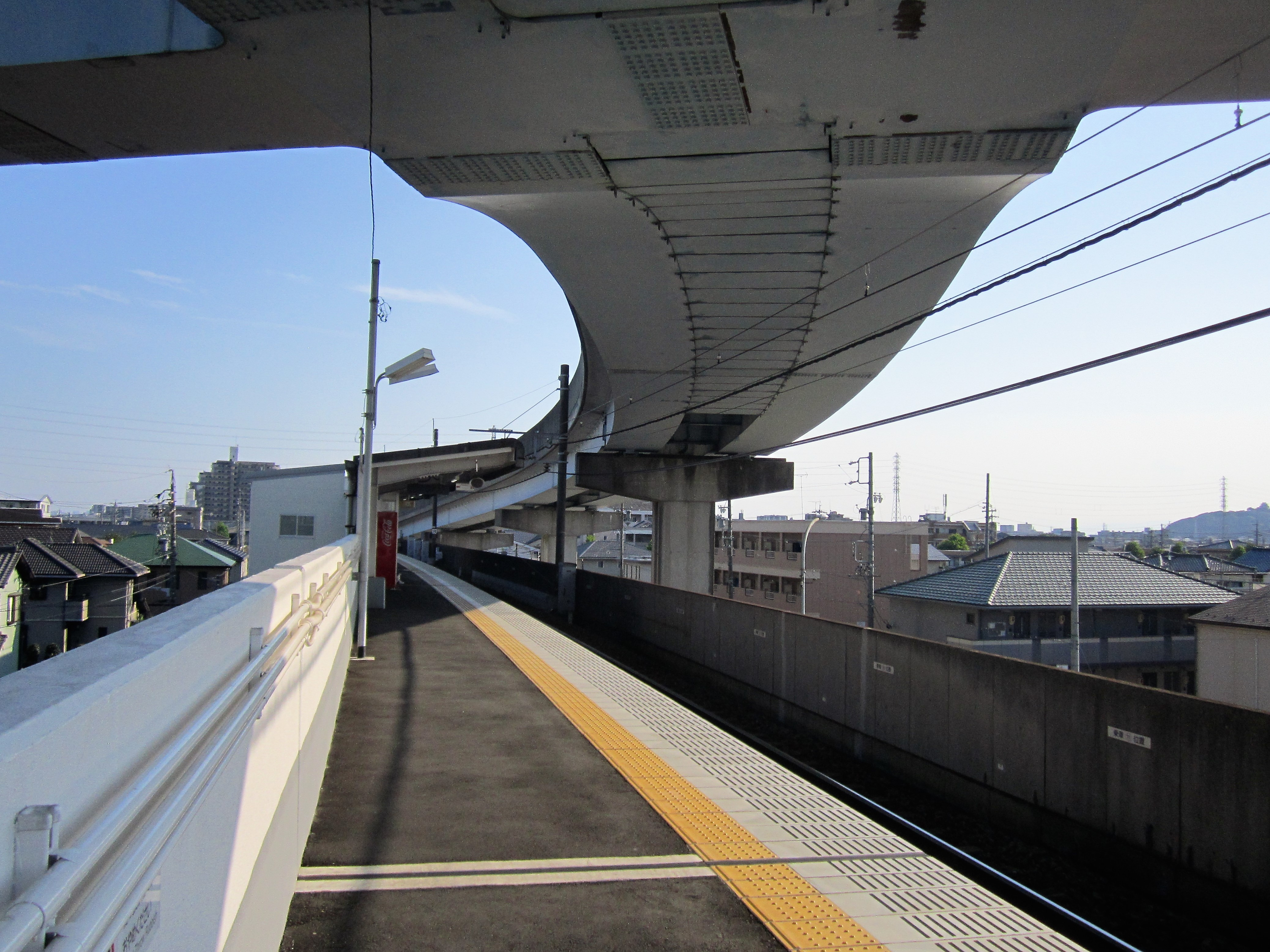 名鉄小牧線 小牧原駅ホーム（頭上は桃花台新交通の軌道跡）